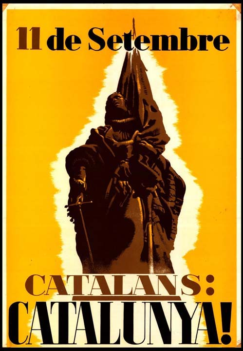 11 de Setembre Rafael Casanova Catalans Catalunya